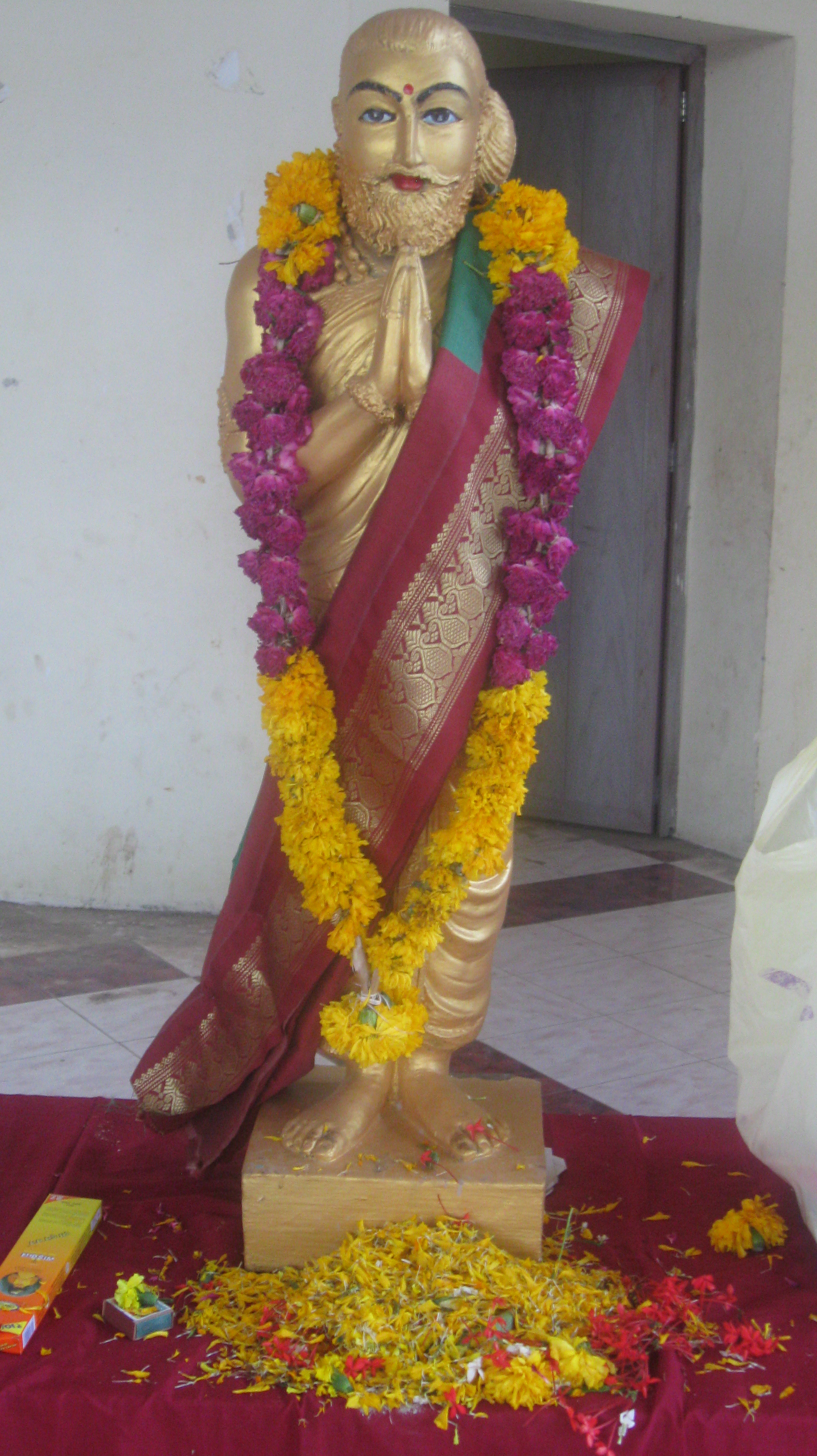 கம்பரின் திருவுருவச் சிலை